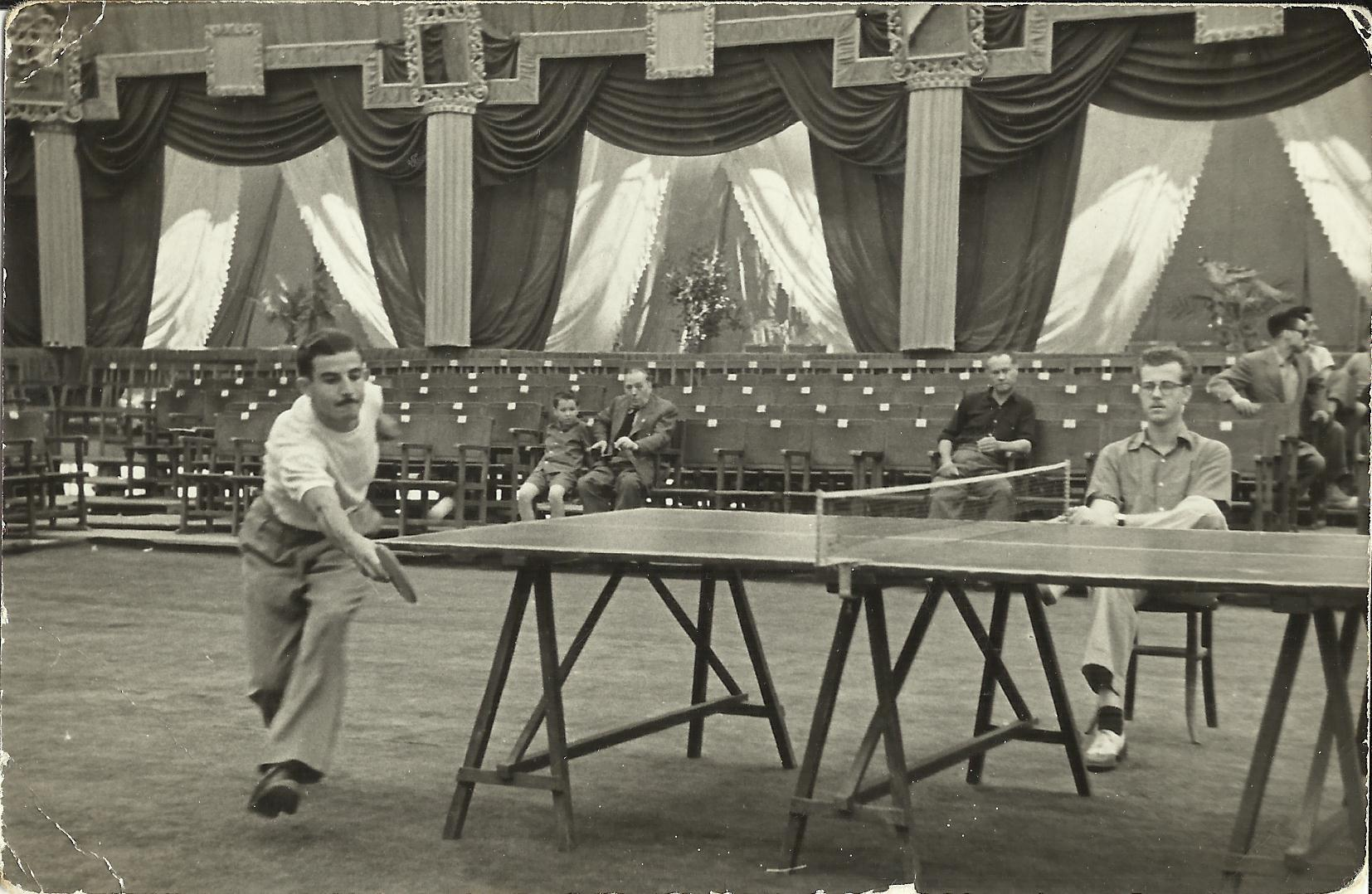 Fotografia del Torneig de Tennis de Taula de la Festa Major del 1954, celebrada a Badalona.